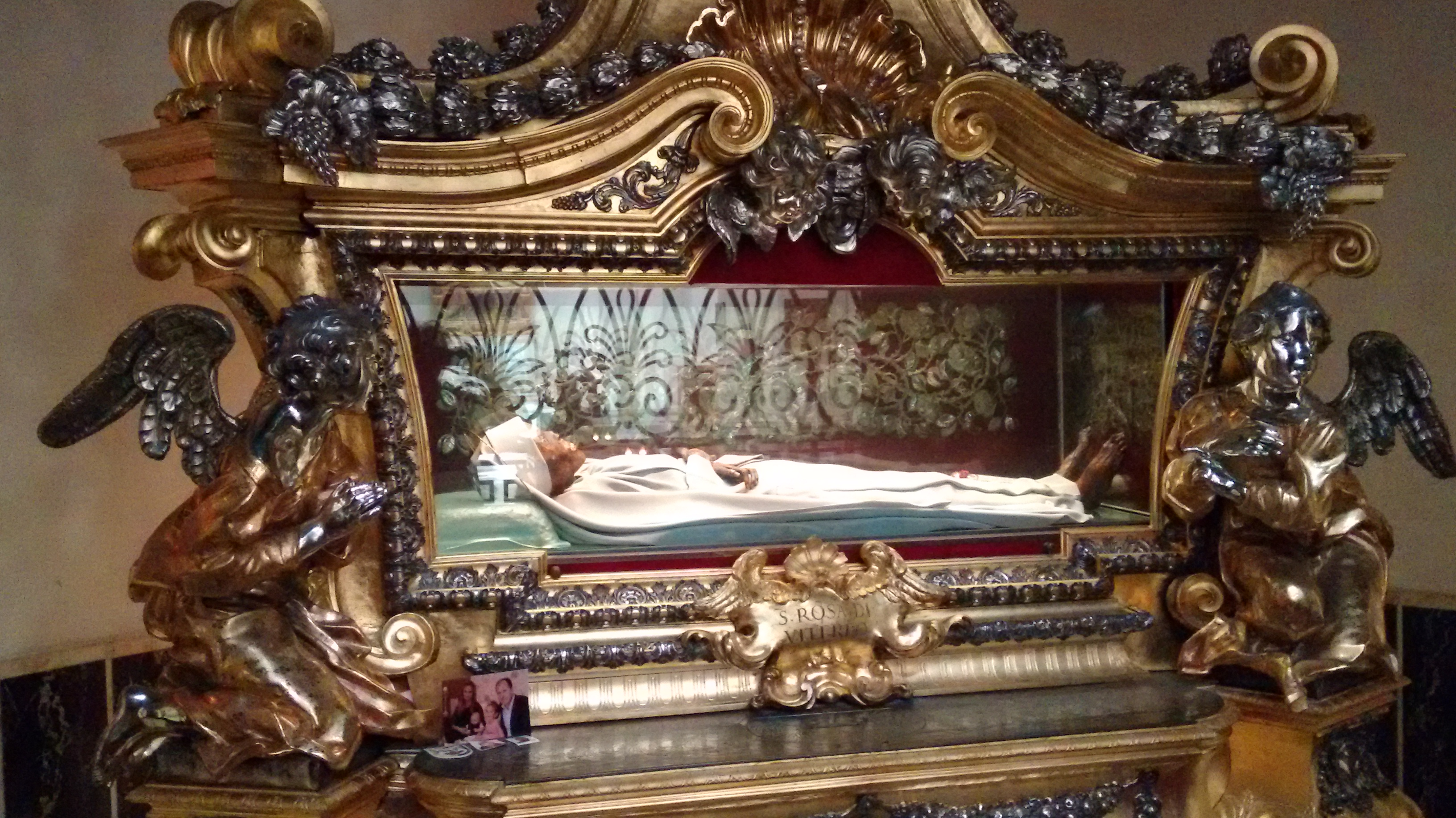 Fotos da Cidade de Viterbo, Itália: Santa Rosa de Viterbo; Monastero Santuario Santa Rosa di Viterbo